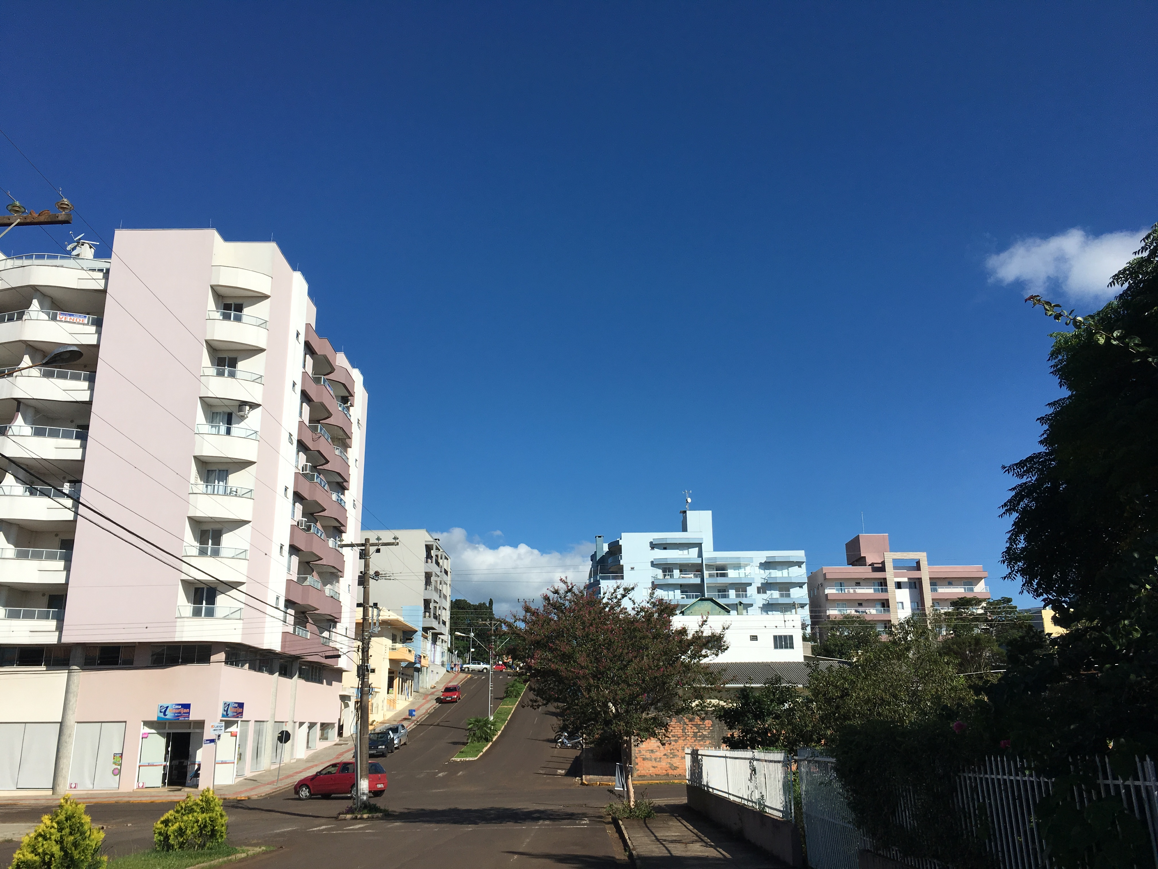 prédios na região central da cidade